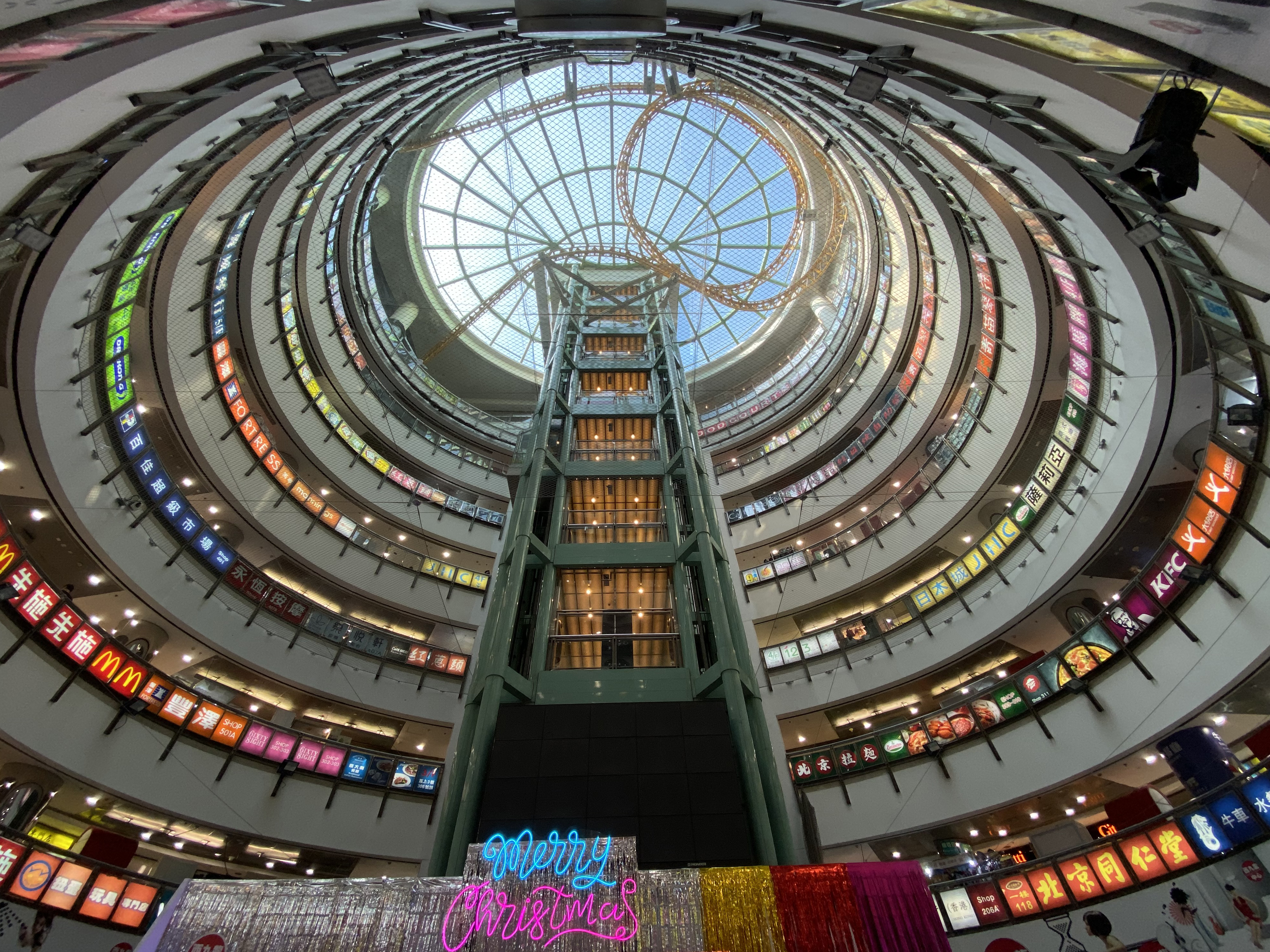 Dragon Centre Atrium